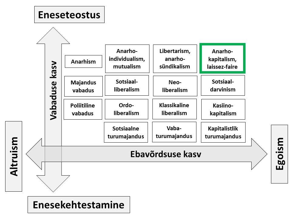 Anarhokapitalism sotsiaalse korra mudelis